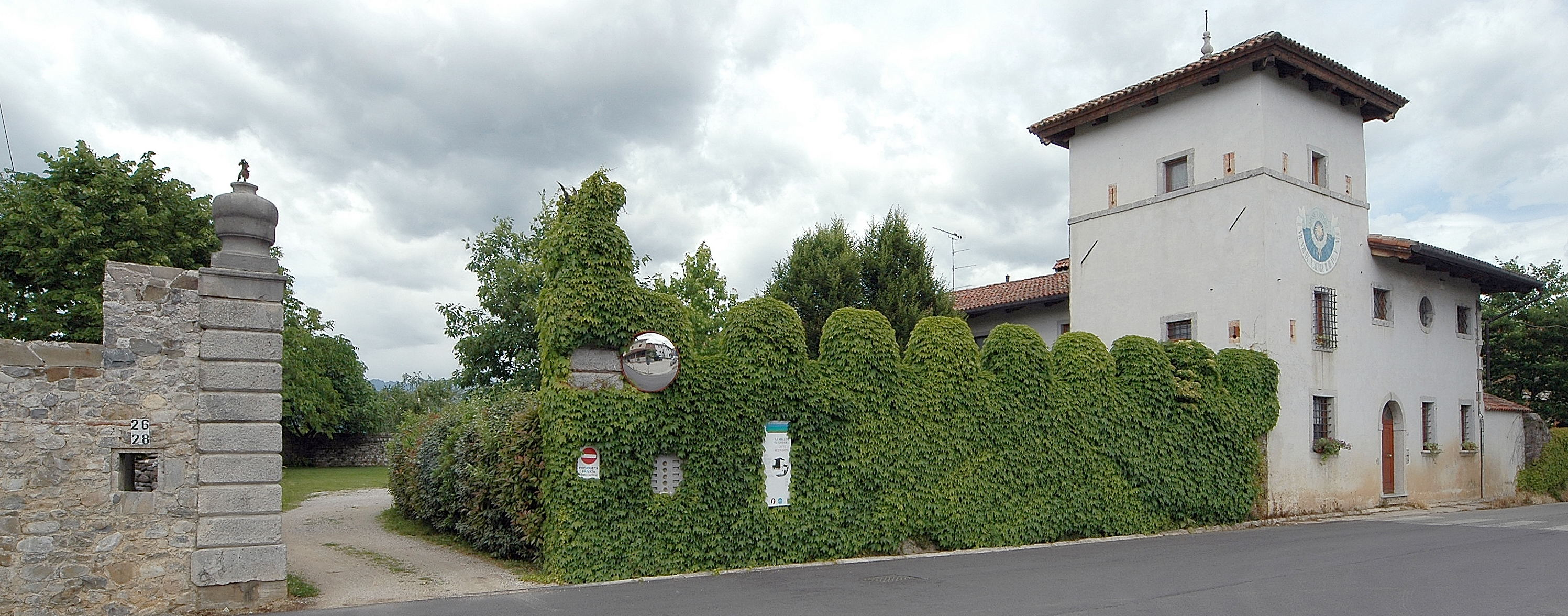 Le Ville di Via Cividina, Reana del Rojale, Udine, Friuli, Italy